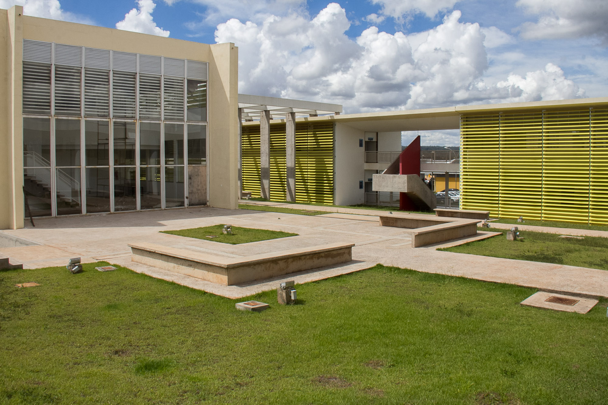 Foto: Luis Gustavo Prado